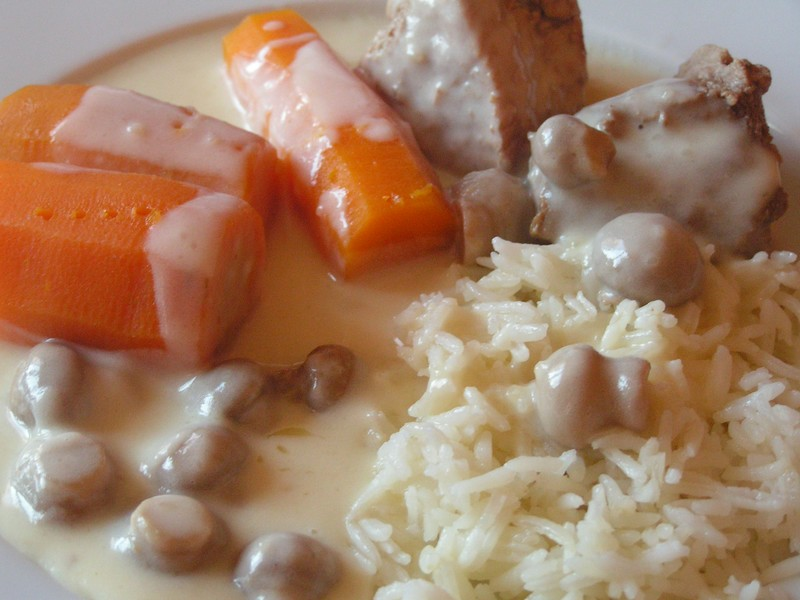 Photo prise sur le site de Magali Kunstmann-Pelchat. L'auteure a donné son accord écrit pour publication sous licence GFDL